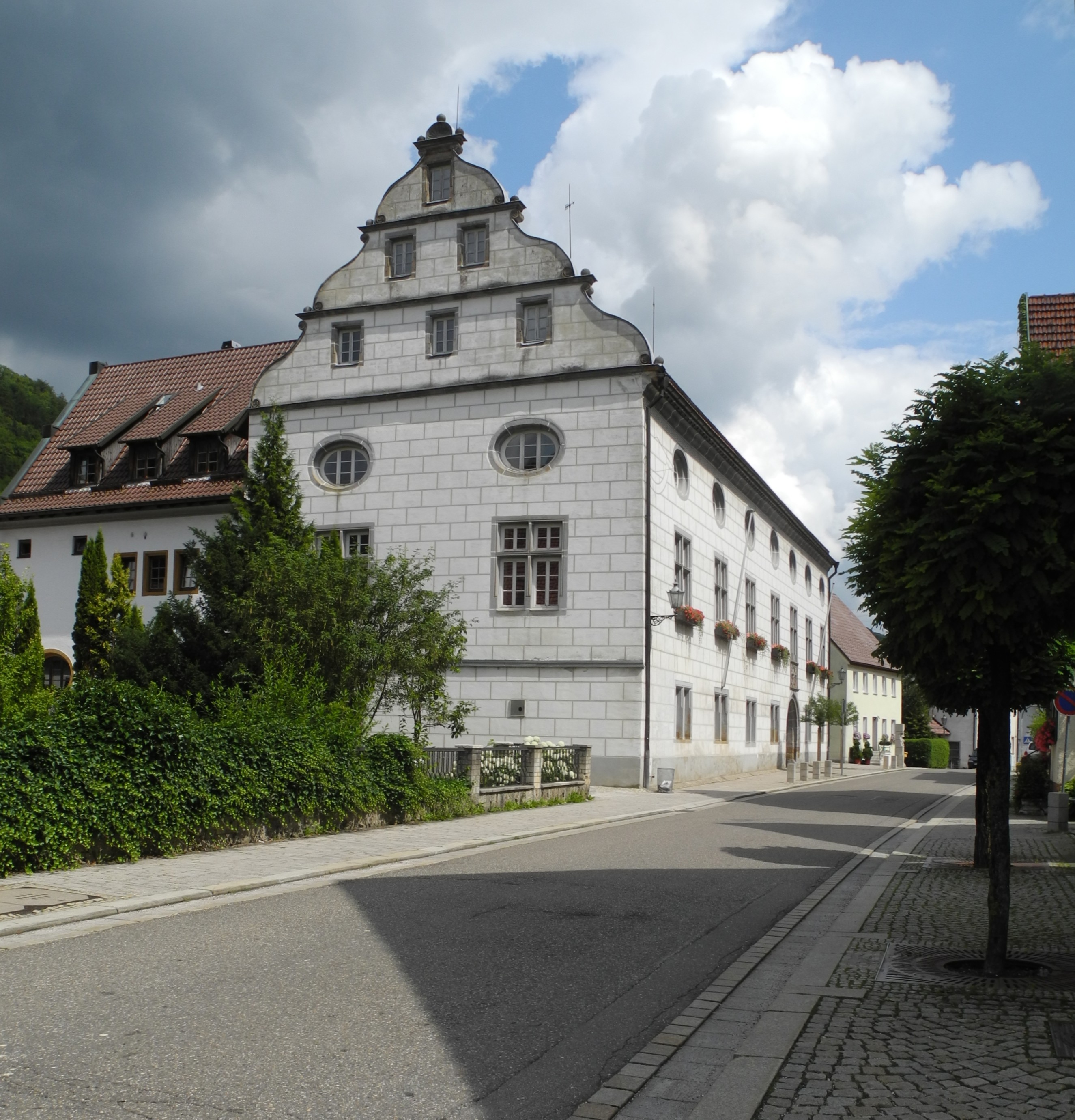 Wiesensteig - Residenzschloss der Helfensteiner (1551)